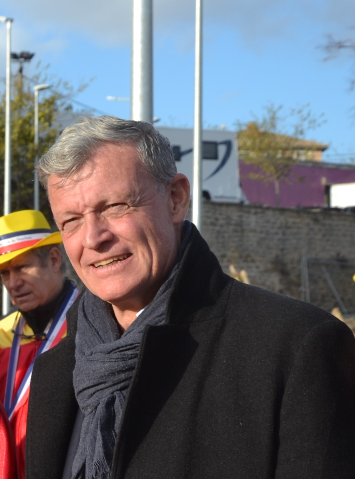 Général Bertrand de la Chesnaie, lors d'une intronisation à Carpentras